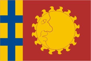 Ohnišov